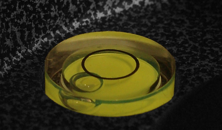 Bulls eye type spirit level